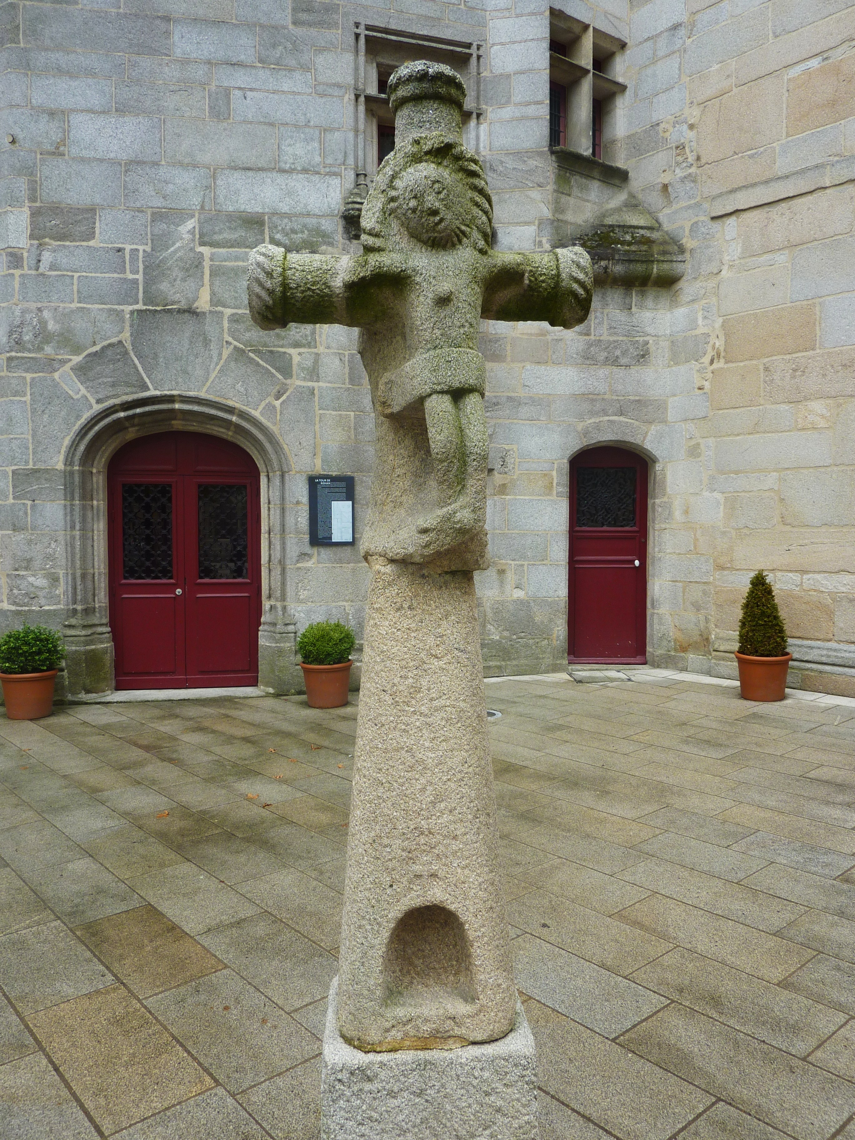 Cour du musée breton de Quimper : calvaire du XVe siècle. Provient de Gouesnach